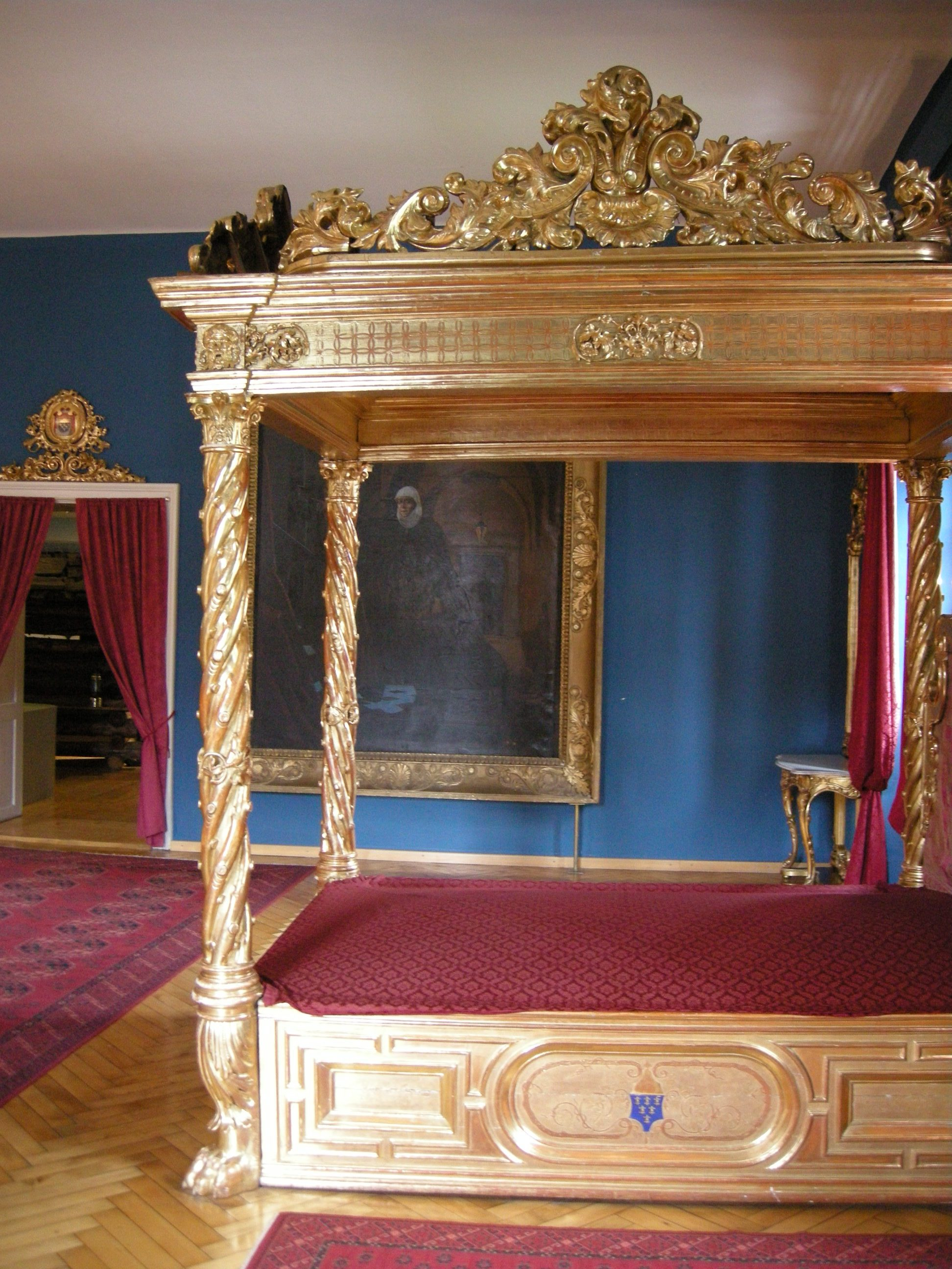 Spittal an der drau, schloss porcia, museo